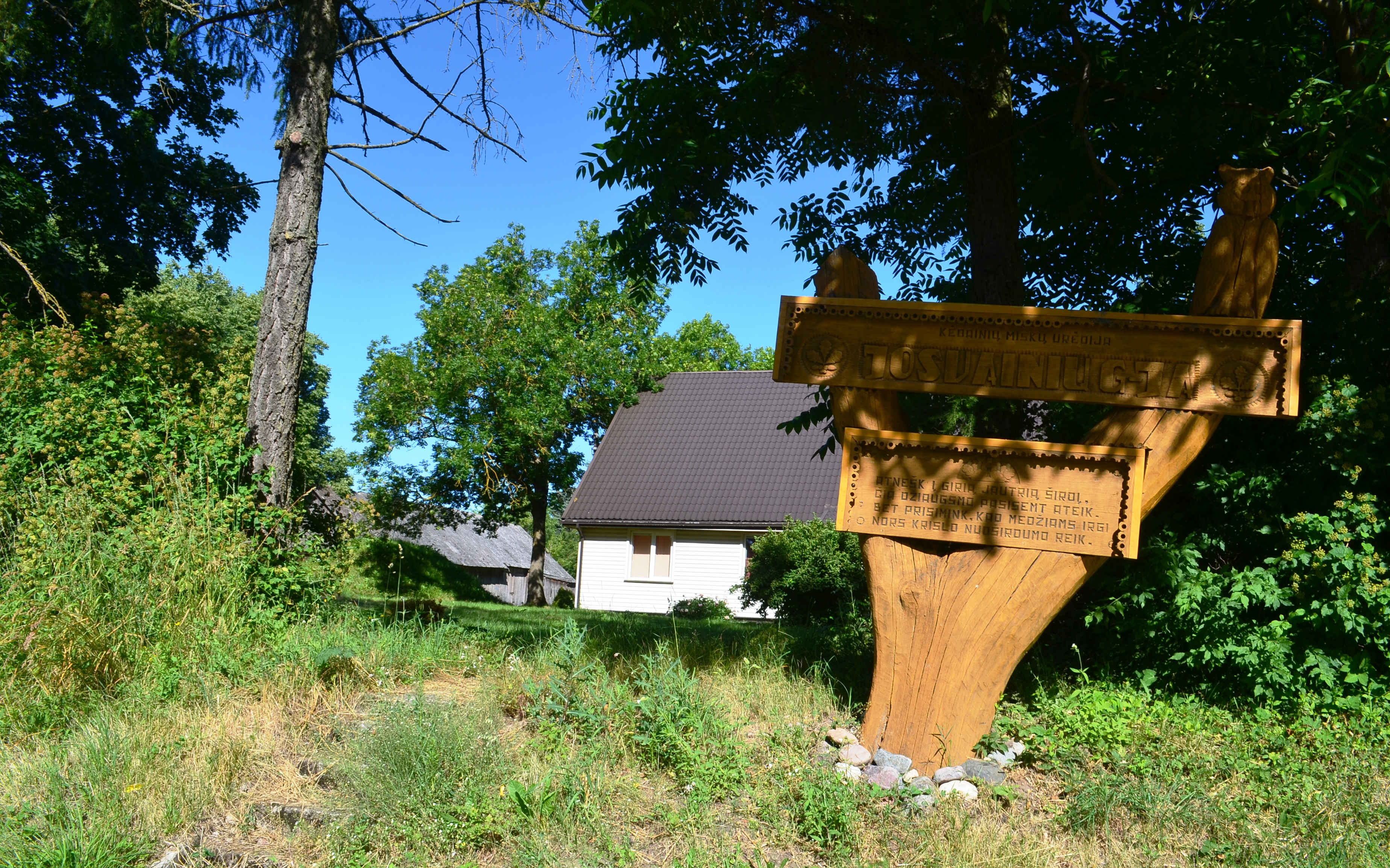 Josvainių girininkija, Juodkaimiai, Kėdainių raj.